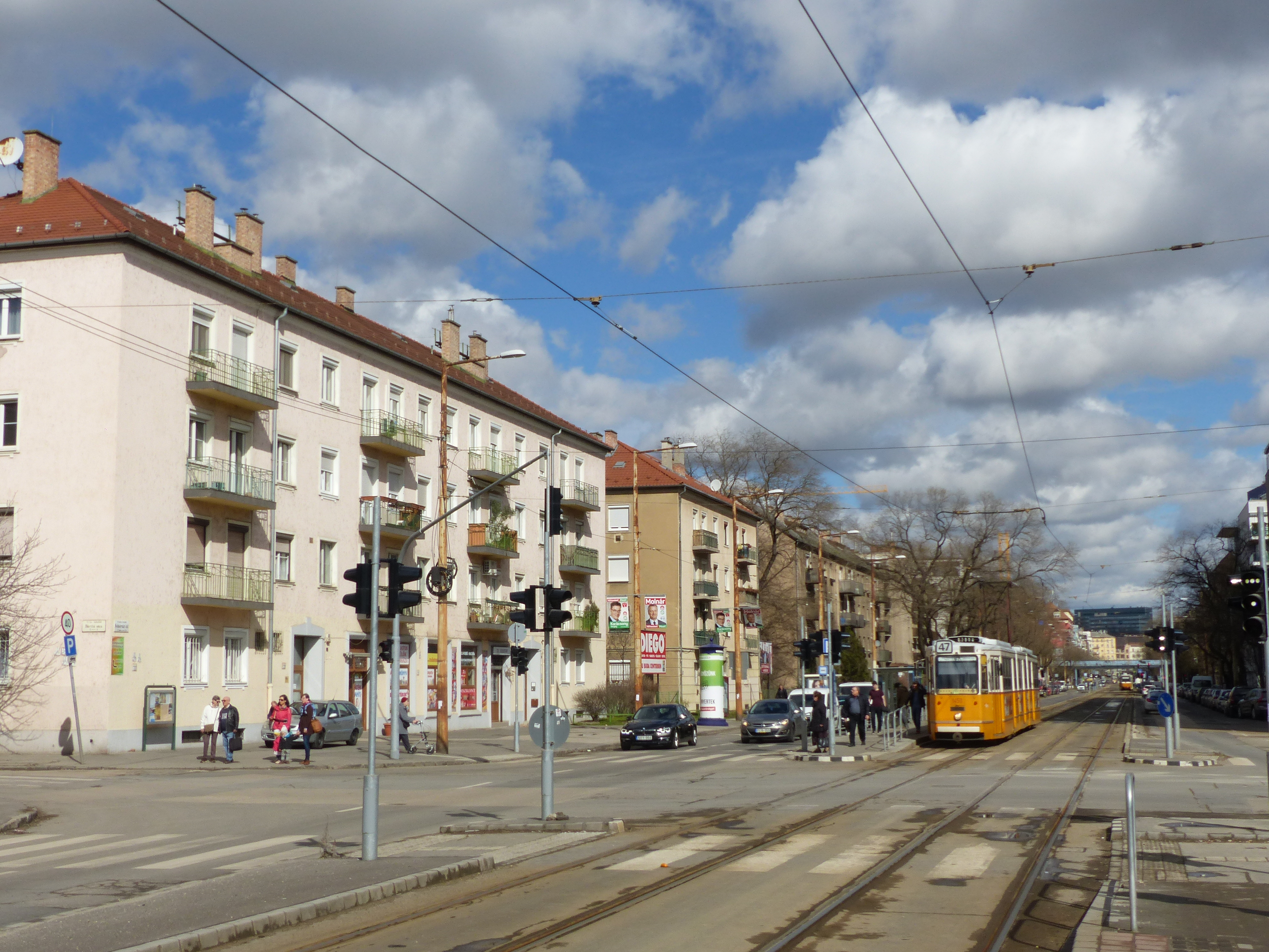 Lágymányos, Fehérvári út, Hauszmann Alajos vill. megálló.. Az időbélyegző fénykép készítésének tényleges időpontját rögzítette.